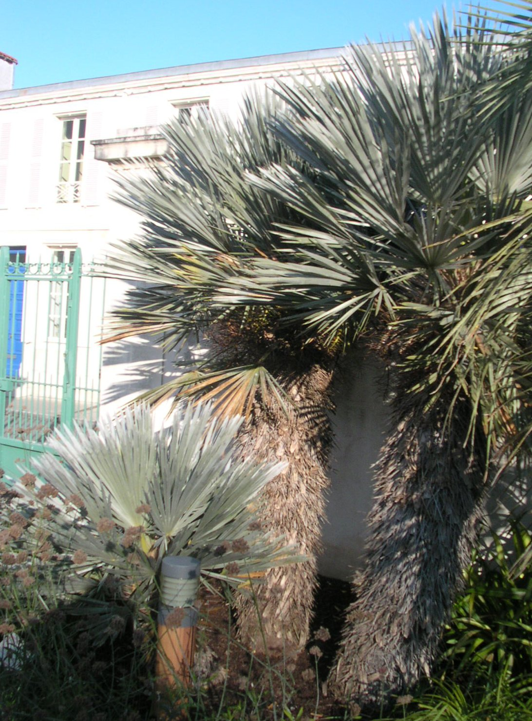 Trithrinax campestris du jardin botanique de La Rochelle (france).